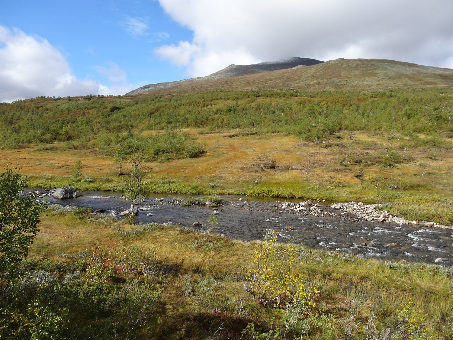 Storulvån med fjället Getryggen bakom